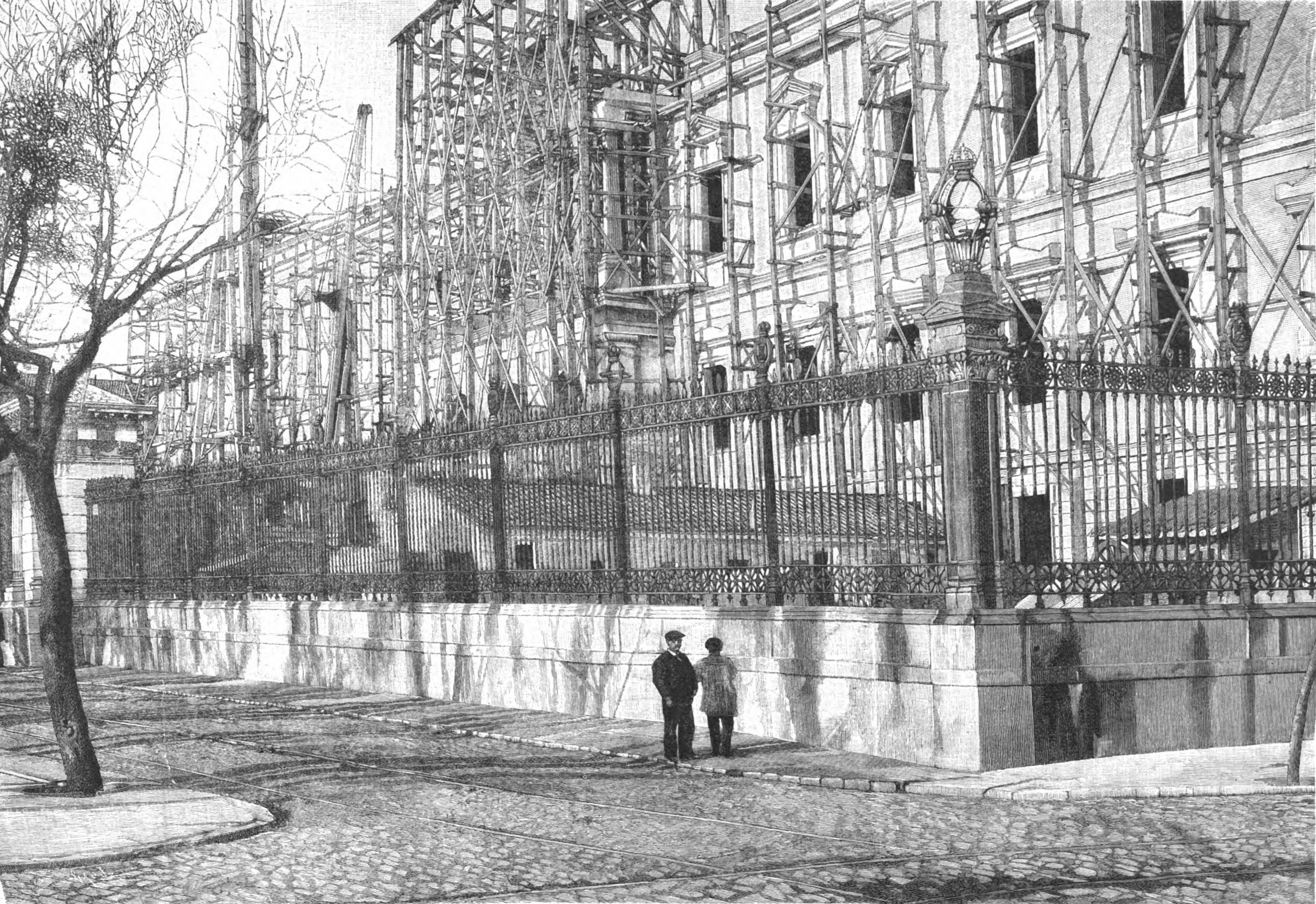 Madrid.—Estado actual de las obras de fábrica del edificio «Biblioteca y Museos Nacionales» (fachada del paseo de Recoletos). De fotografía de D. Nicolás Caldevilla.